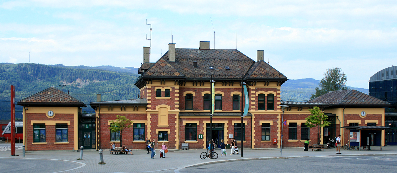 Lillehammer stasjon, Dovrebanen. Bygd 1894. Arkitekt: Paul Due. Tilbygg på begge sider i forbindelse med OL 1994.